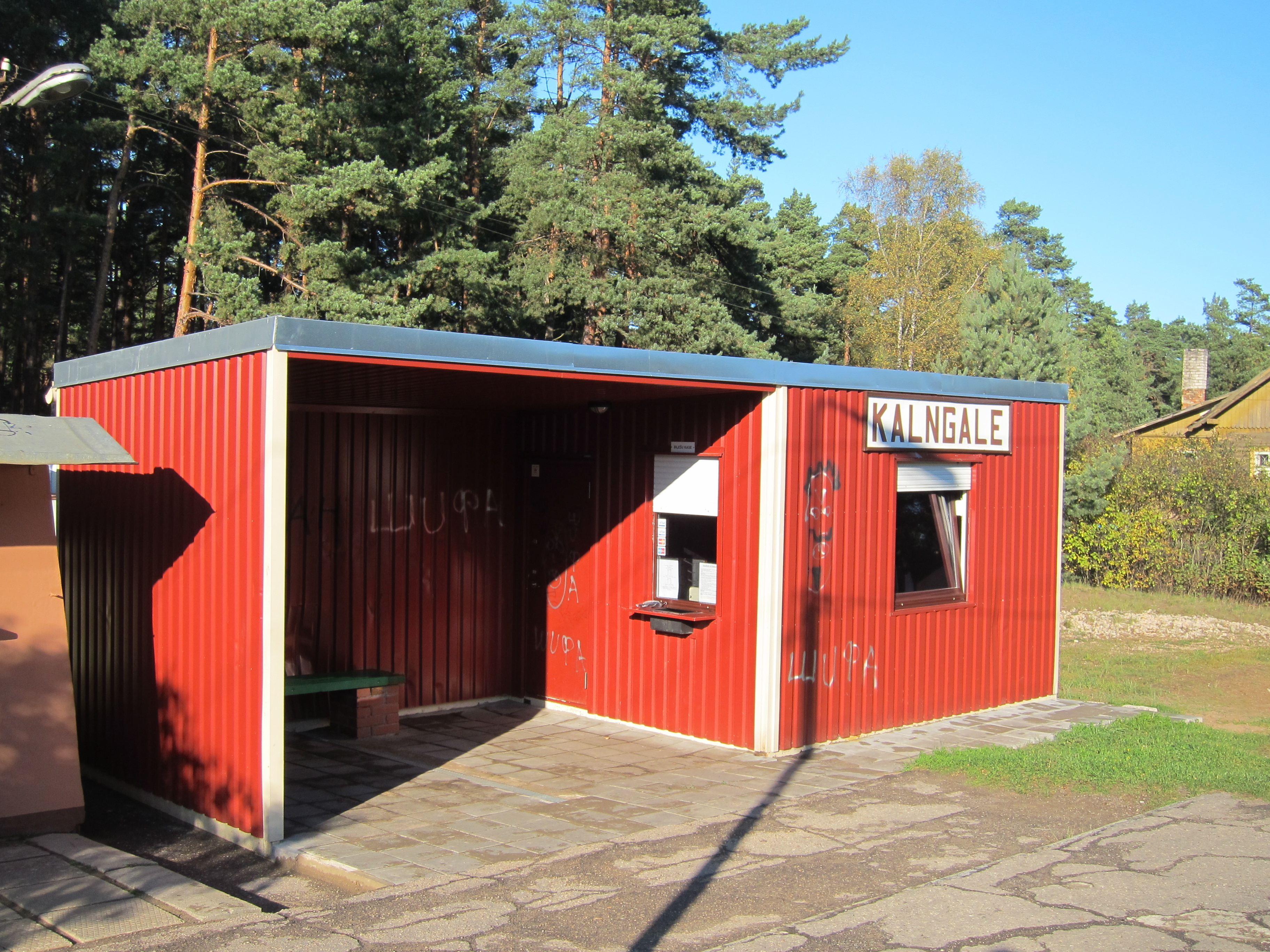 Пассажирский павильон остановочного пункта Калнгале